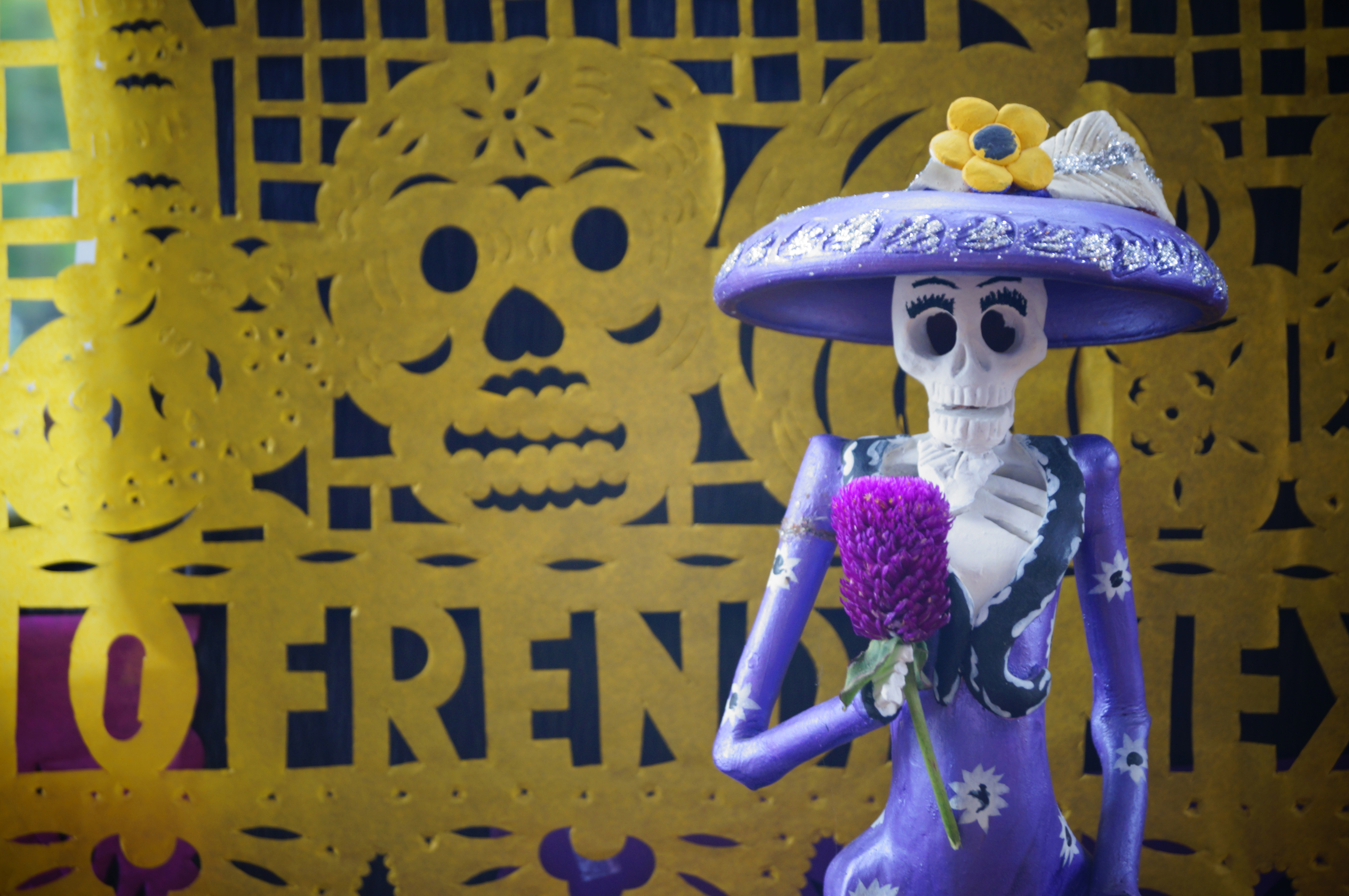 Catrina y papel picado